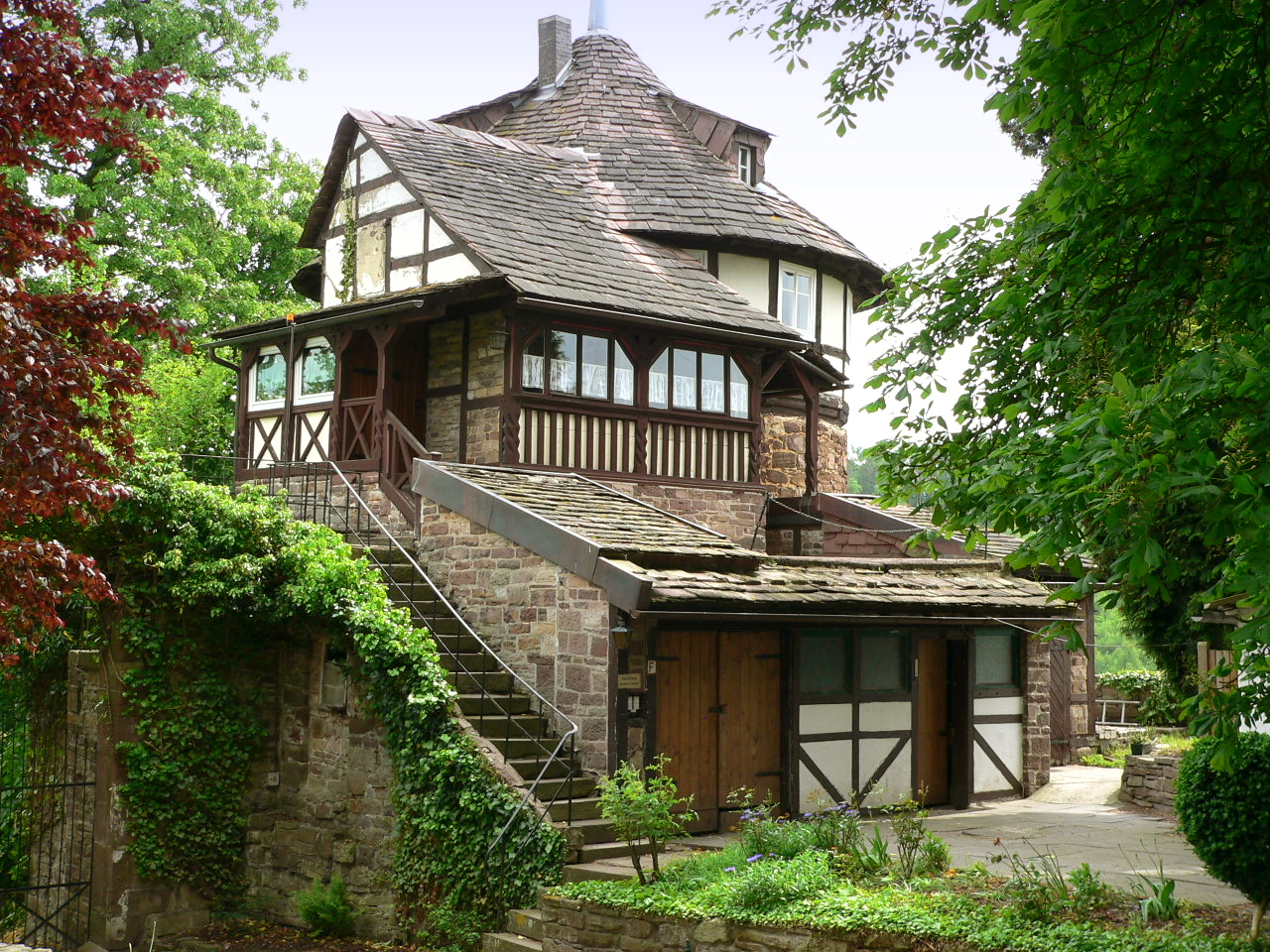 Die Trendelburg – Gästehaus auf der Bastion, Hessen, Germany